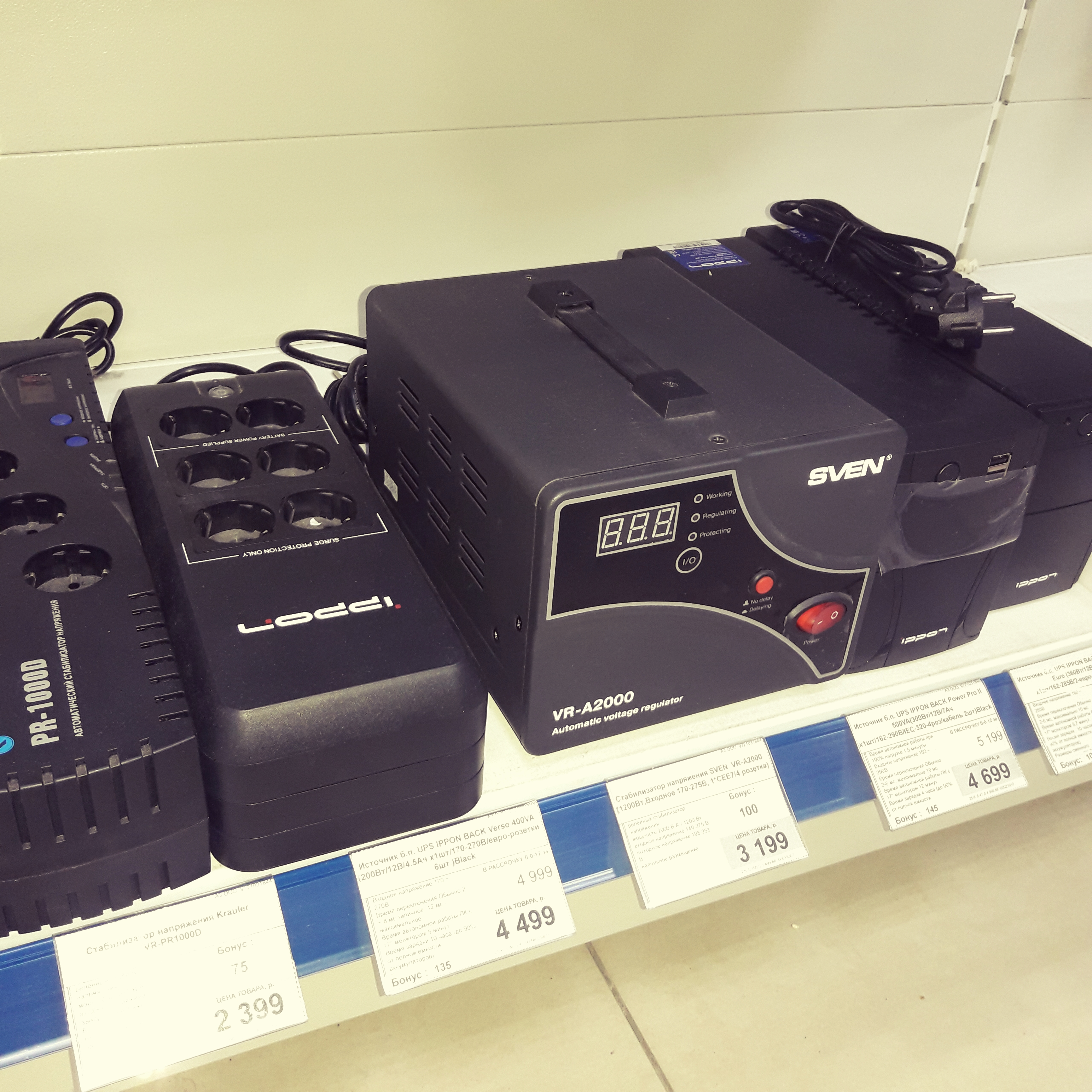 Источник бесперебойного питания и стабилизаторы